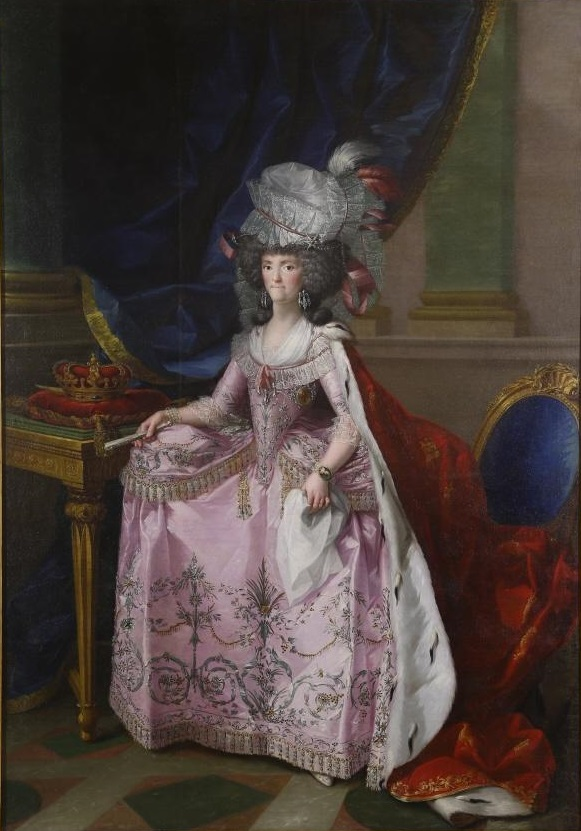 Retrato de la reina María Luisa de Parma (1751-1819), que fue reina consorte de España por su matrimonio con el rey Carlos IV y también la madre del rey Fernando VII.